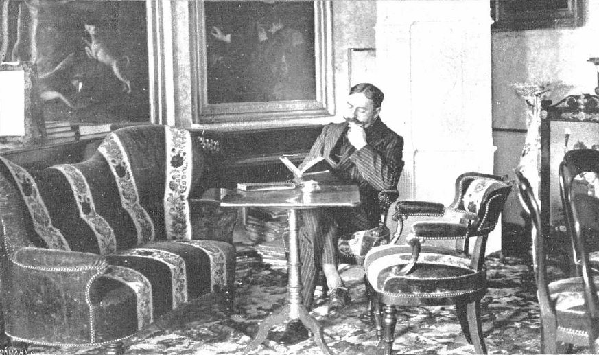 Fotografía del pretendiente carlista al trono de España Jaime de Borbón y Borbón-Parma tomada en su estudio del palacio de Frohsdorf y publicada en 1912.